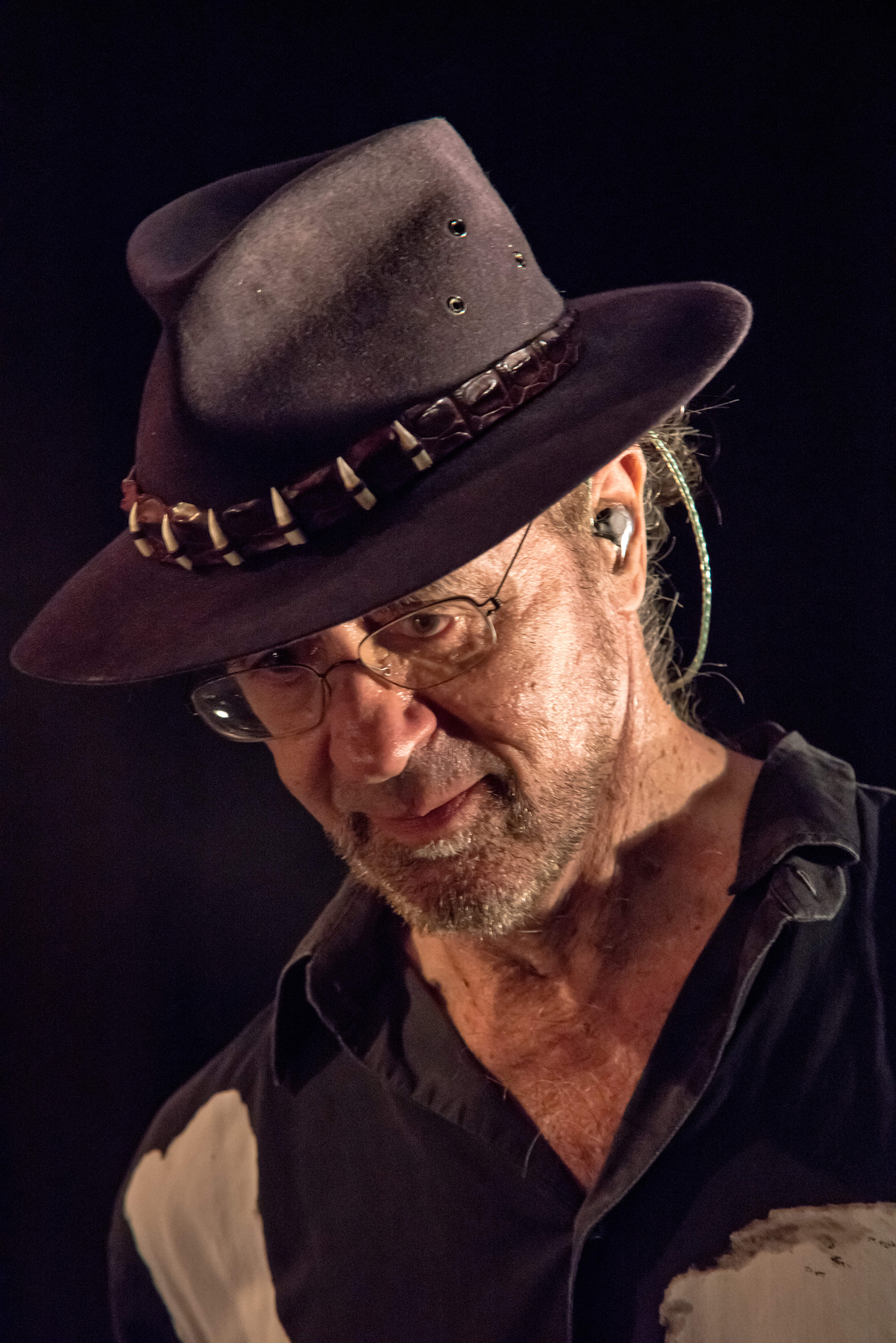 Bilder vom Zelt Musik Festival 2017 in Freiburg im Breisgau